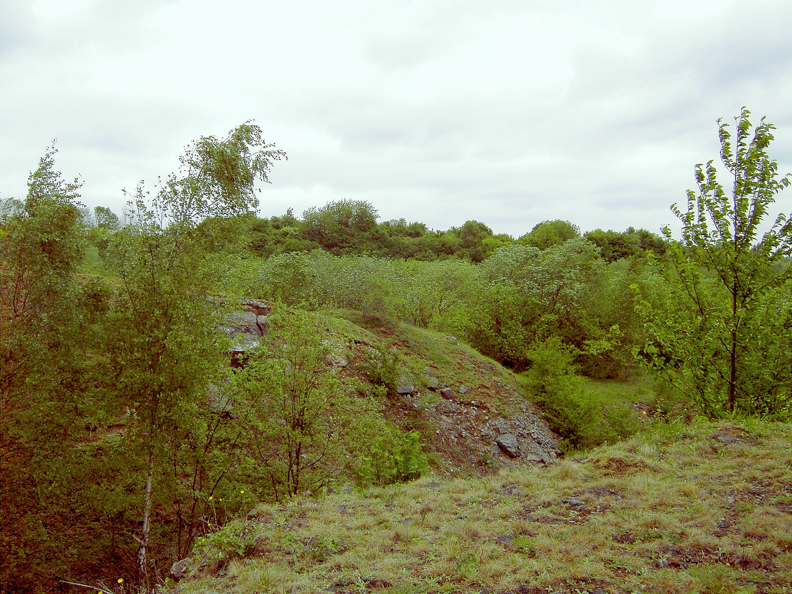 Landschaftsaufnahme im Naturschutzgebiet Bärenstein